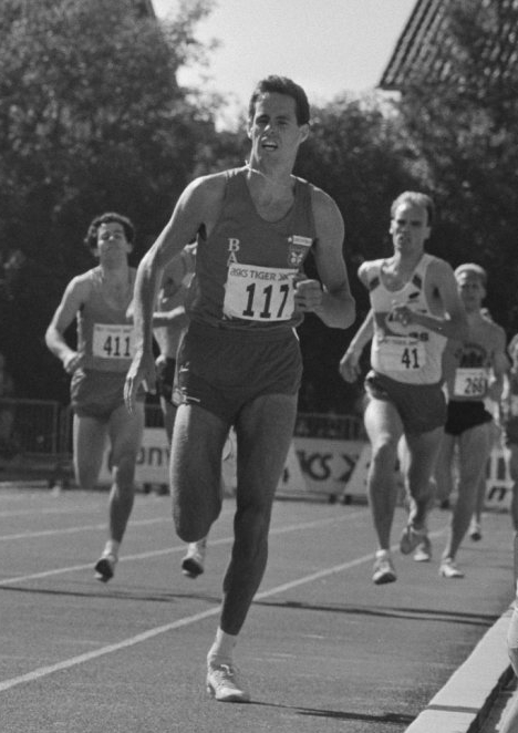 NK atletiek; Han Kulker (no. 117) wint 1500 meter.